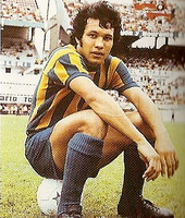 Ramón Bóveda el 19 de diciembre de 1971 antes del partido ante Newell's Old Boys, por la semifinal del Torneo Nacional 1971.